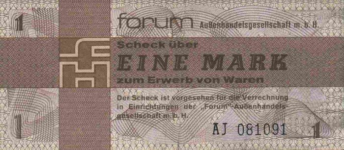 Forumscheck Vorderseite 1 Mark